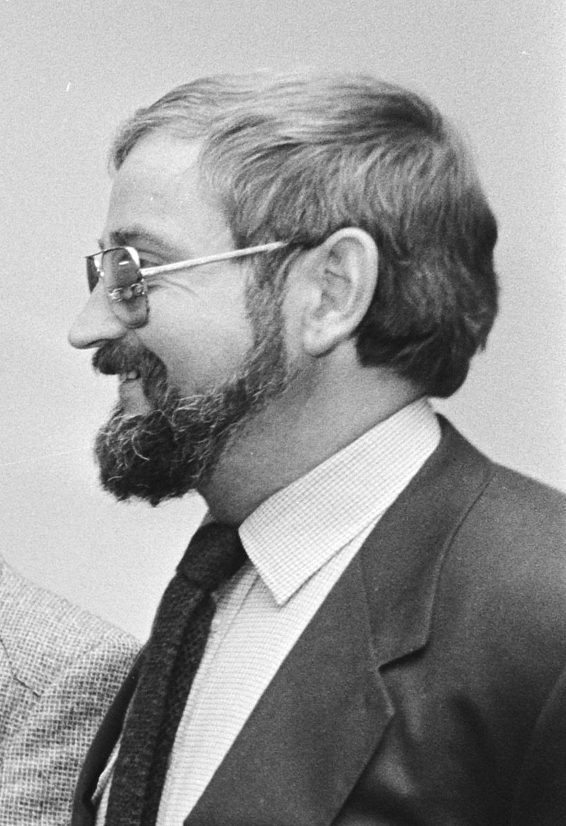 Collectie / Archief : Fotocollectie Anefo Reportage / Serie : CDA-Pastoresconferentie Beschrijving : V.l.n.r. Premier Lubbers, dhr. Oostlander directeur van het wetenschappelijk bureau van het CDA, Mgr. Bär, dhr. Fiolet (secretaris van de Raad van Kerken) en dhr. Houtepen Datum : 13 september 1983 Trefwoorden : bisschoppen, conferenties, directeuren, kerken, ministers-presidenten, politieke partijen, samenwerking Persoonsnaam : Fiolet, Herman, Houtepen, Anton, Lubbers, Ruud, Oostlander, A.M. Fotograaf : Croes, Rob C. / Anefo Auteursrechthebbende : Nationaal Archief Materiaalsoort : Negatief (zwart/wit) Nummer archiefinventaris : bekijk toegang 2.24.01.05 Bestanddeelnummer : 932-6961